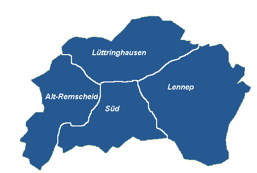 die Karte stellt die Stadtbezirke von Remscheid dar